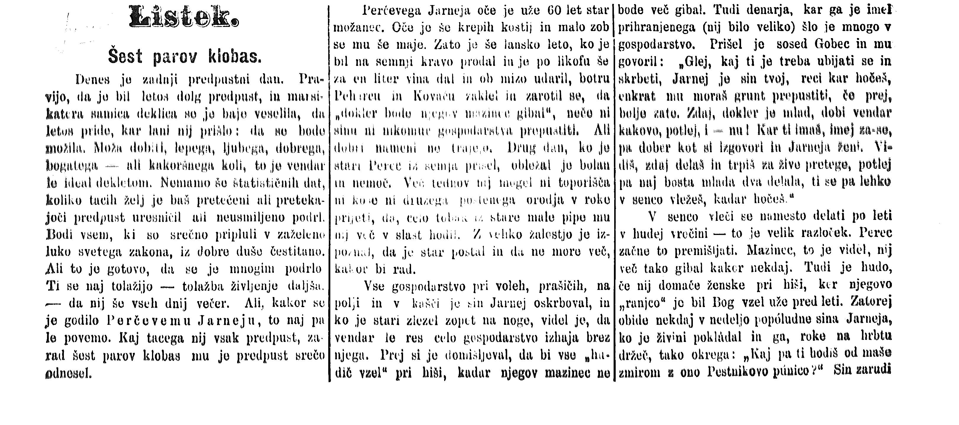 Začetek krajšega proznega besedila Josipa Jurčiča Šest parov klobas iz časopisa Slovenski narod, leto 1878.